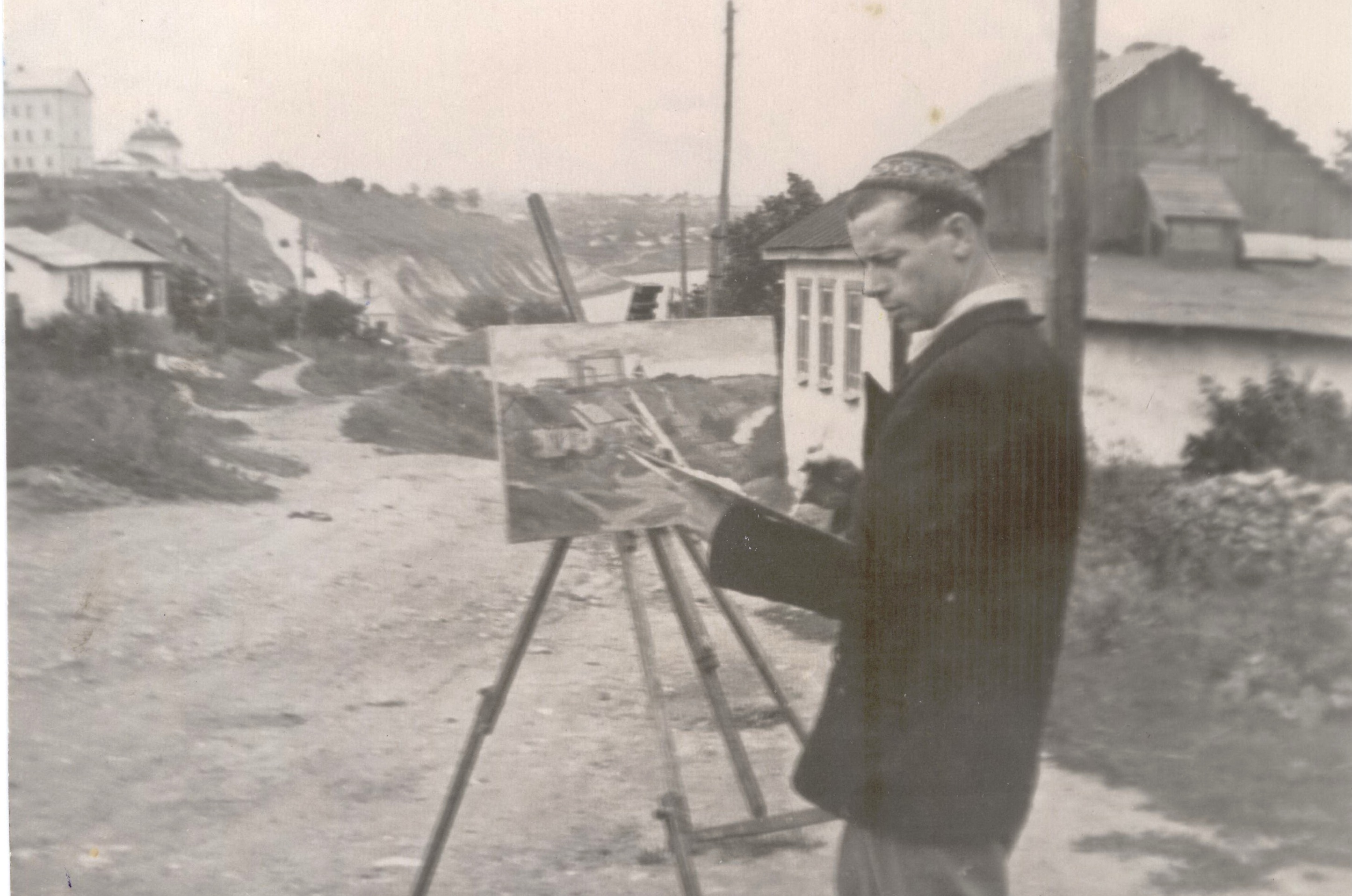 Селищев А.Н.